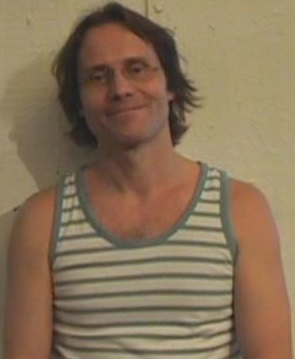 Dick Eriksson I Stockholm, Foto: Daniel Åhs Karlsson